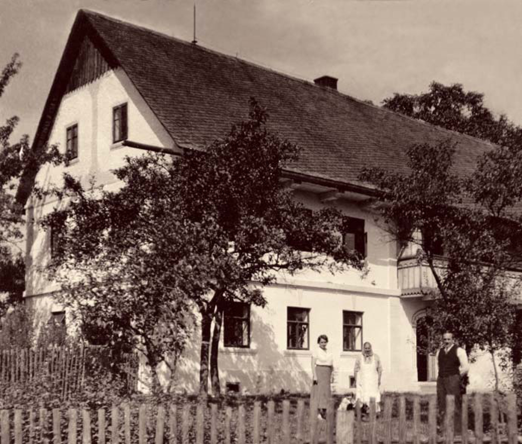 Mužákův statek